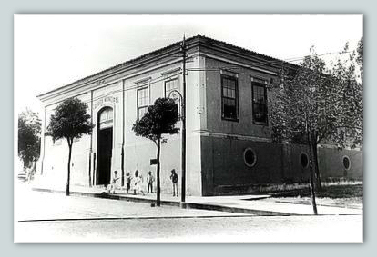 Prédio da Câmara Municipal de São Carlos do Pinhal, que foi demolido em 1926